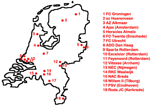 Eredivisie Clubs Seizoen 2006/2007